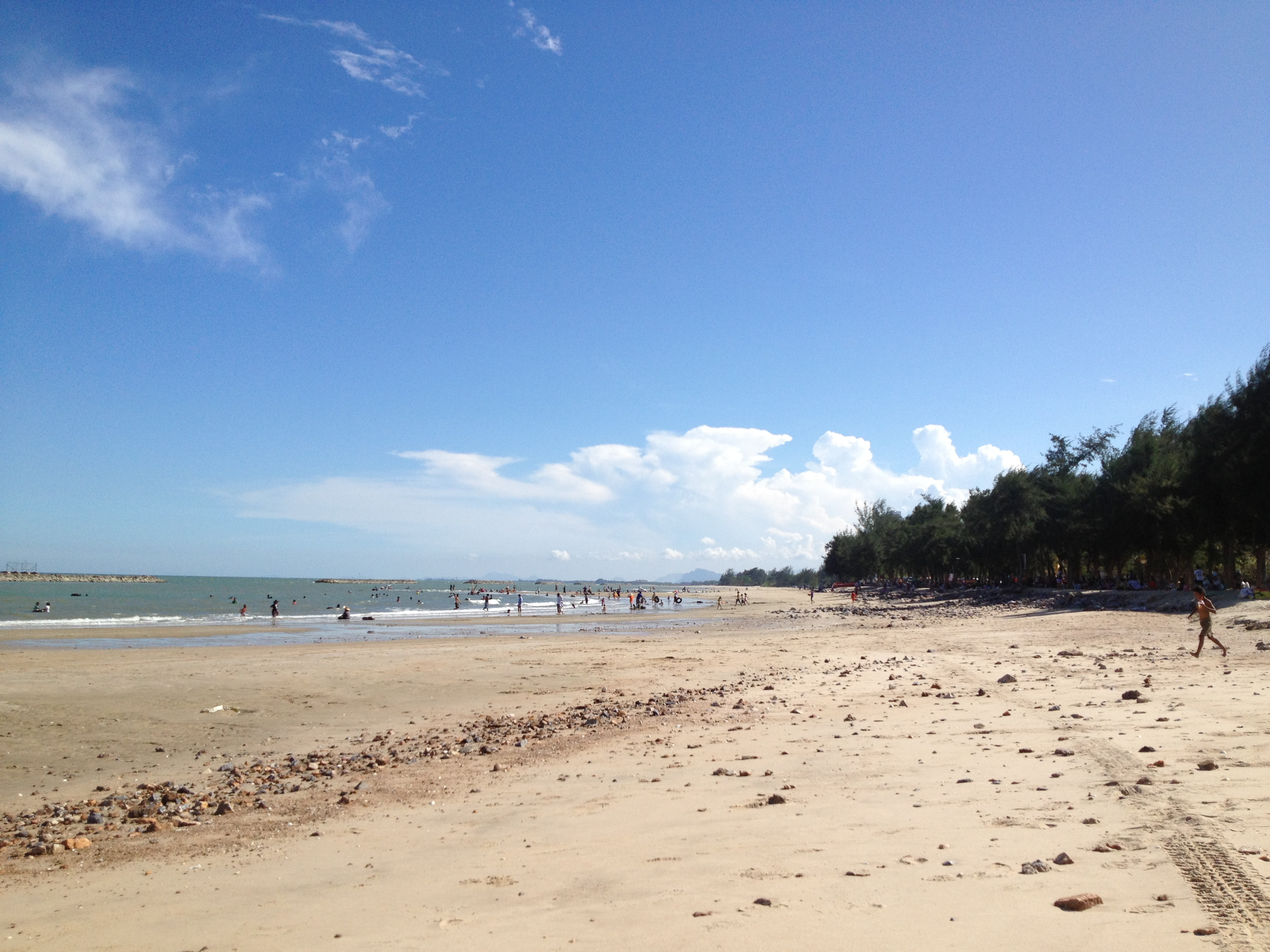 หาดเจ้าสำราญ จ.เพชรบุรี